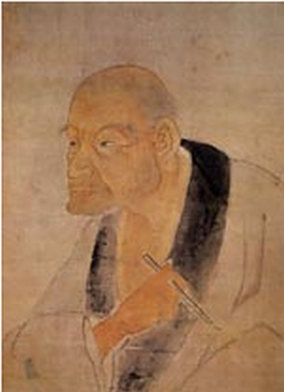 Portrait du peintre Kanō Tannyū.